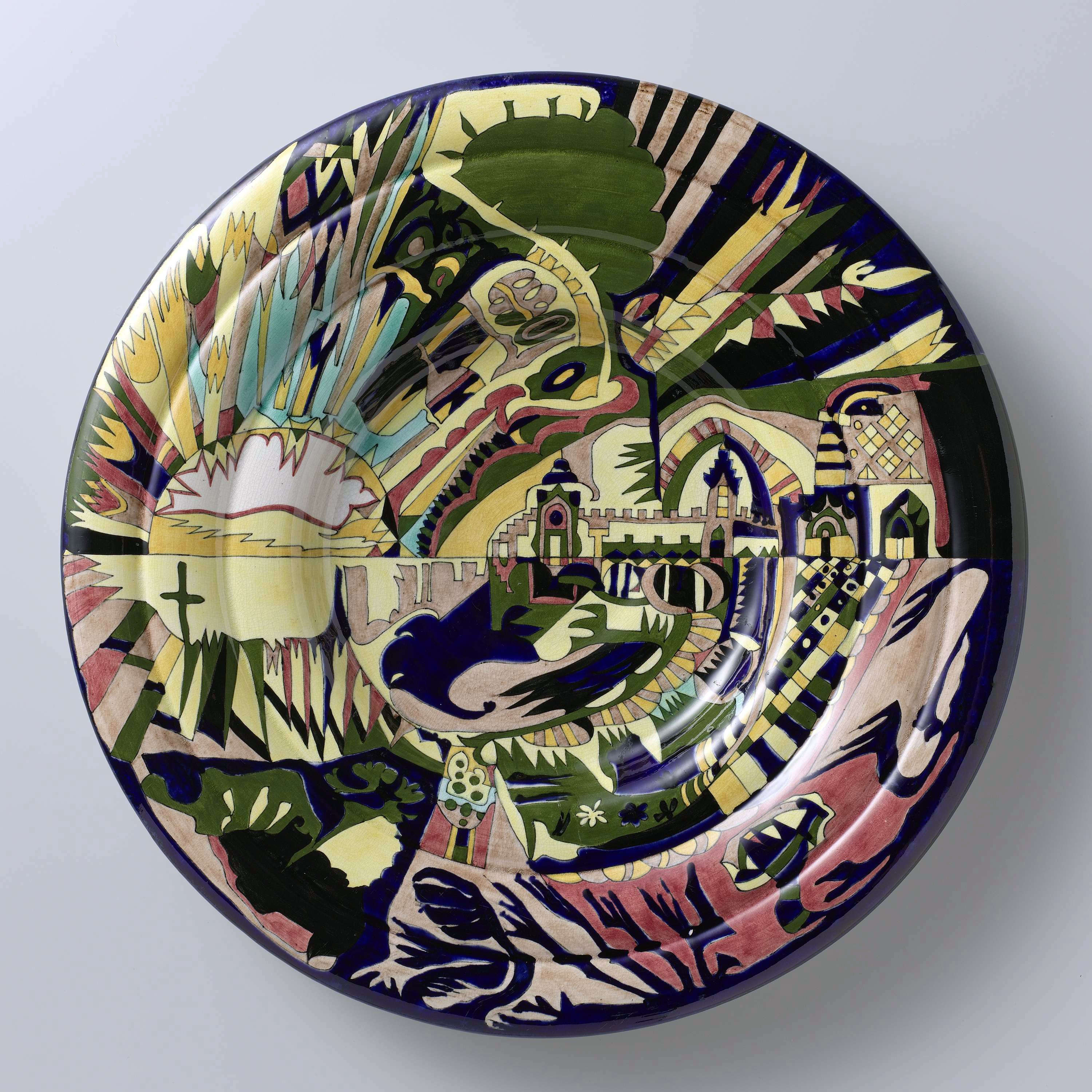 Ontwerp van Theo Colenbrander voor N.V. Haagsche Plateelfabriek Rozenburg. Wandbord van aardewerk, geribd, polychroom beschilderd met het patroon 'Constantinopel'. Ophanggaten in de voetring. De kleuren zijn licht- en donkergeel, licht- en donkergroen, licht- en donkerblauw, lichtbruin en rose.